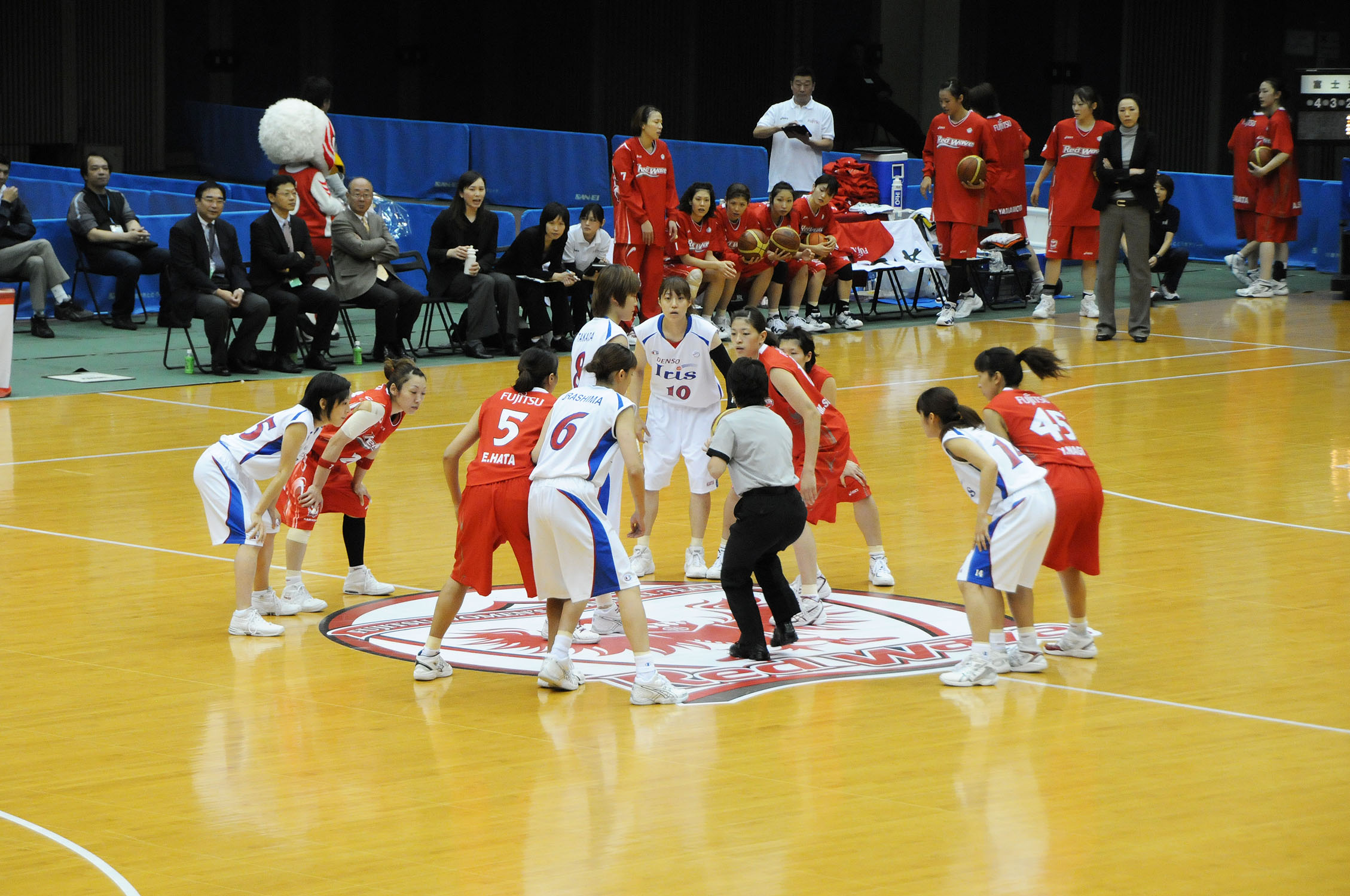 WJBL 10-11レギュラーリーグ、富士通対デンソー。とどろきアリーナで。